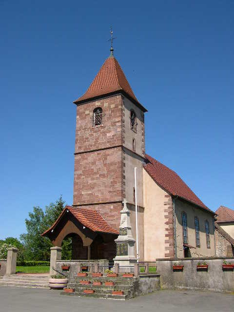 L'église Saints-Julien-et-Vincent à Novillars (Territoire de Belfort) Photo prise en août 2004 par LP90 Copyright : licence GFDL LP90